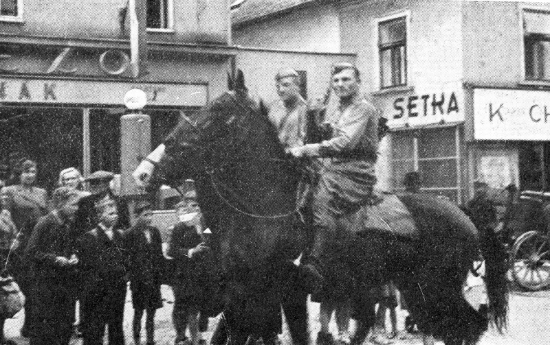 Sovětští vojáci v Boskovicích v květnu 1945